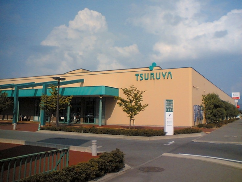 Supermarket TSURUYA Nagano-minami store(Nagano-shi, Nagano, Japan)